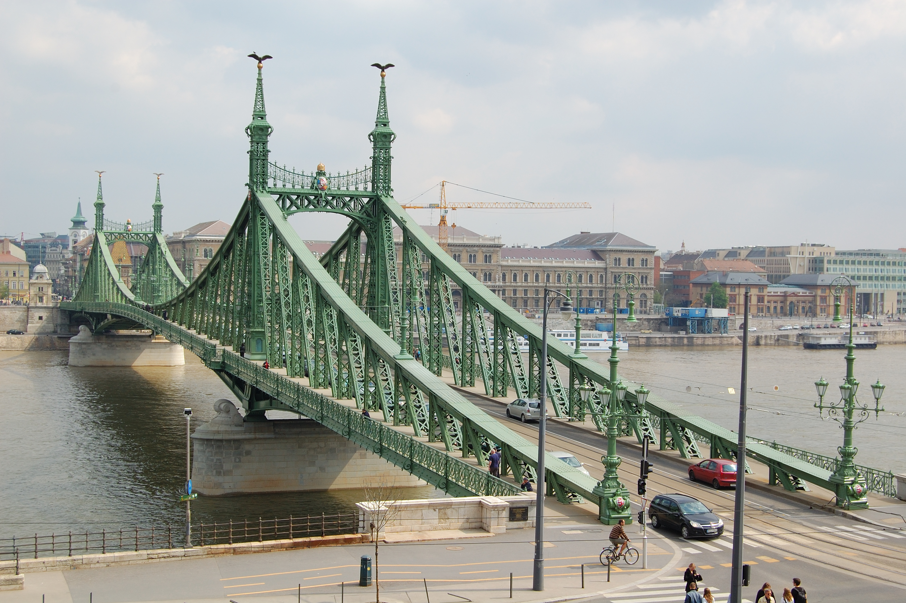 Szabadság Bridge in Budapest.